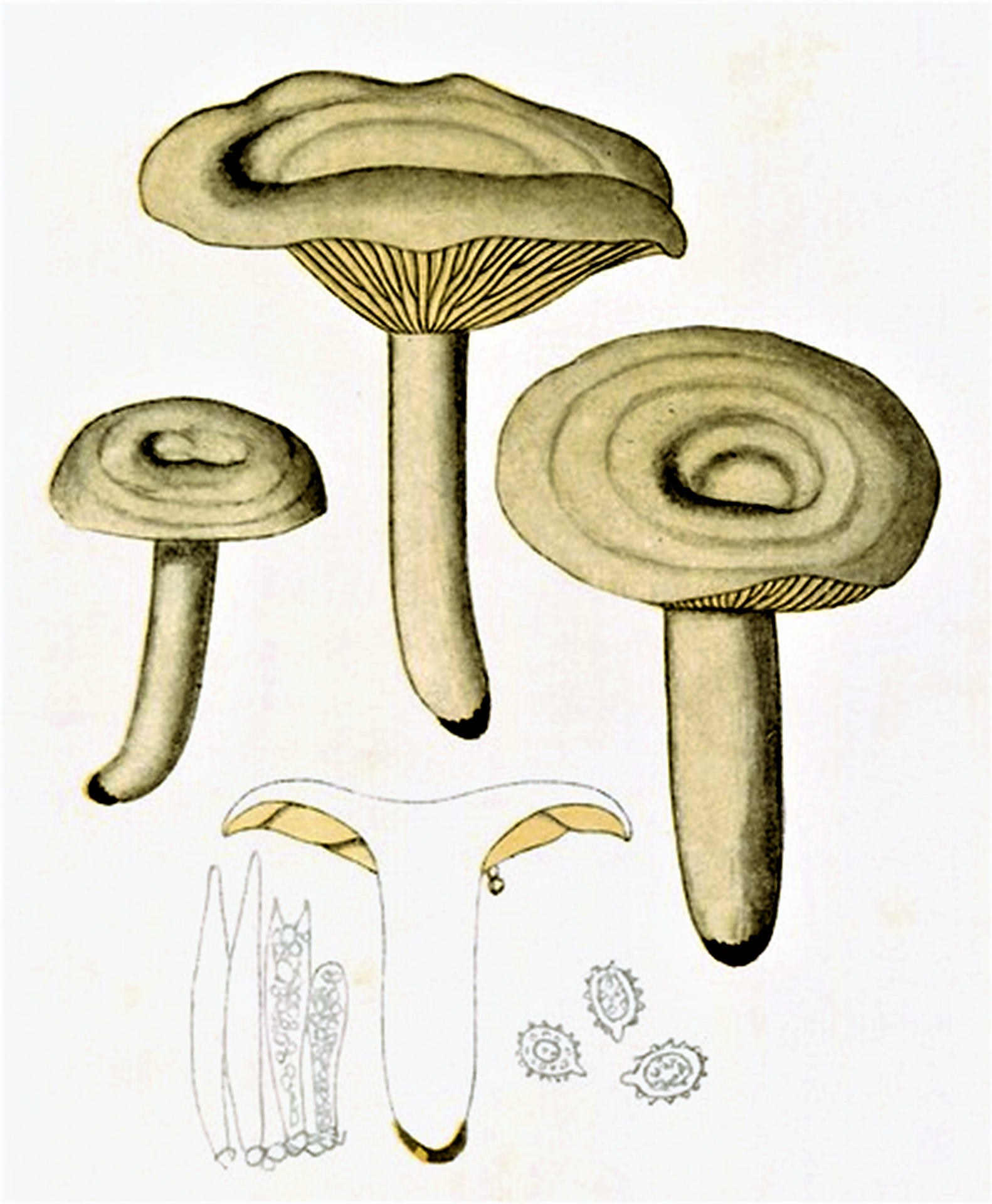 Bres.: Lactarius pyrogalus (Bull. ex Fr.) (1838)